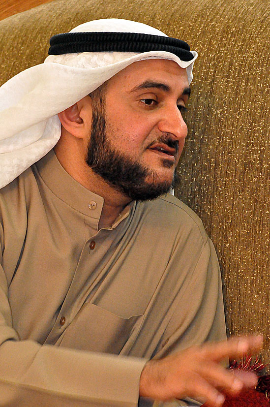 محمد حسن الكندري